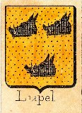 Armes de Lupel : d'or, à trois hures de sanglier de sable, deux en chef, une en pointe.